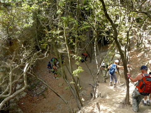 Wadi khik - Mount Carmel Part of Israel National Trail נחל חיק זורם במורדותיו המערביים של הר הכרמל. ראשית הנחל באזור הכרמל הגבוה ליד היישוב עוספיה ליד נקודת רום כרמל . הוא זורם מקו פרשת המים לכוון מערב ונשפך לנחל אורן. הנחל הוא חלק ממסלול שביל ישראל.